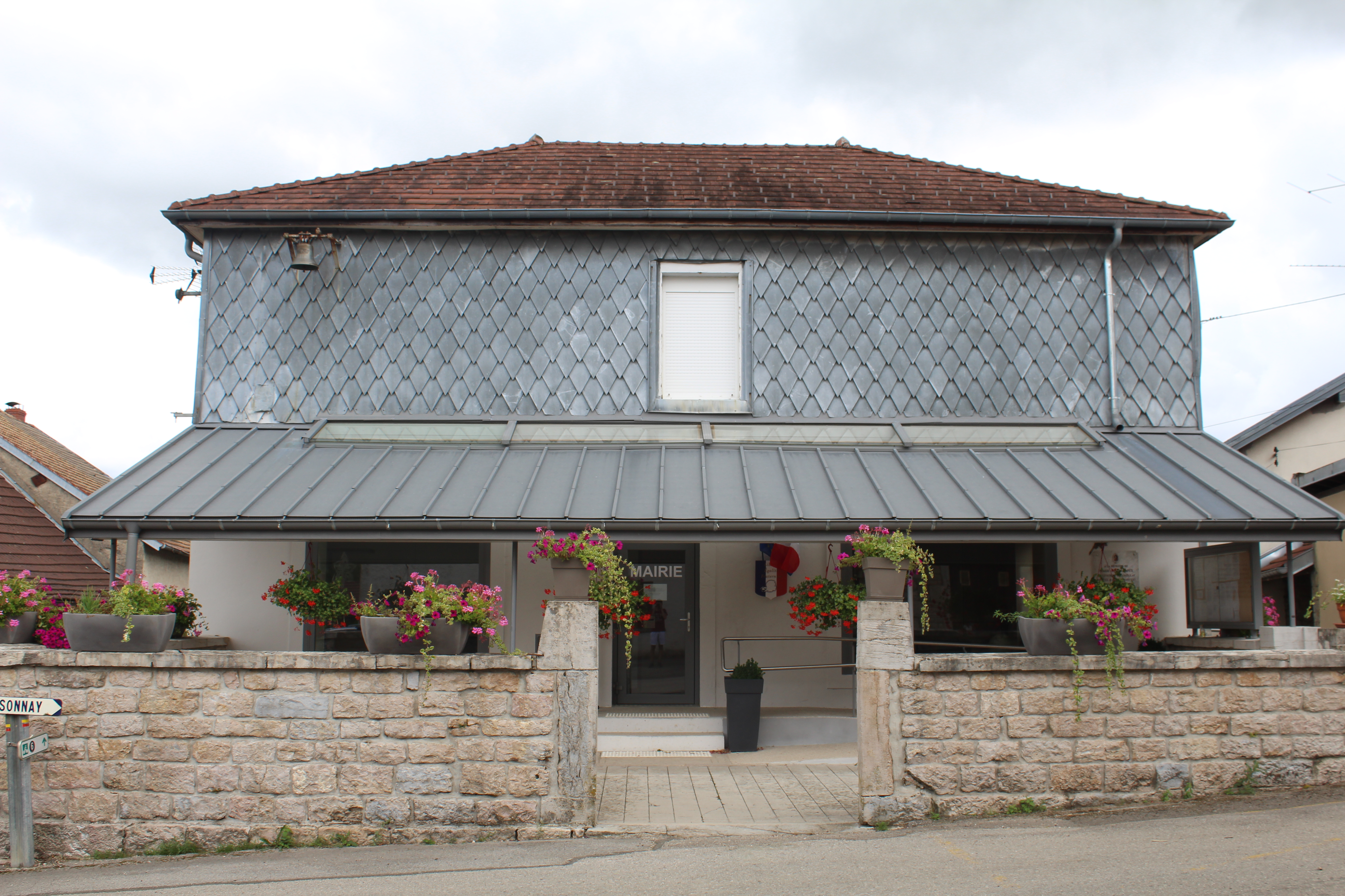 Mairie de Largillay-Marsonnay.